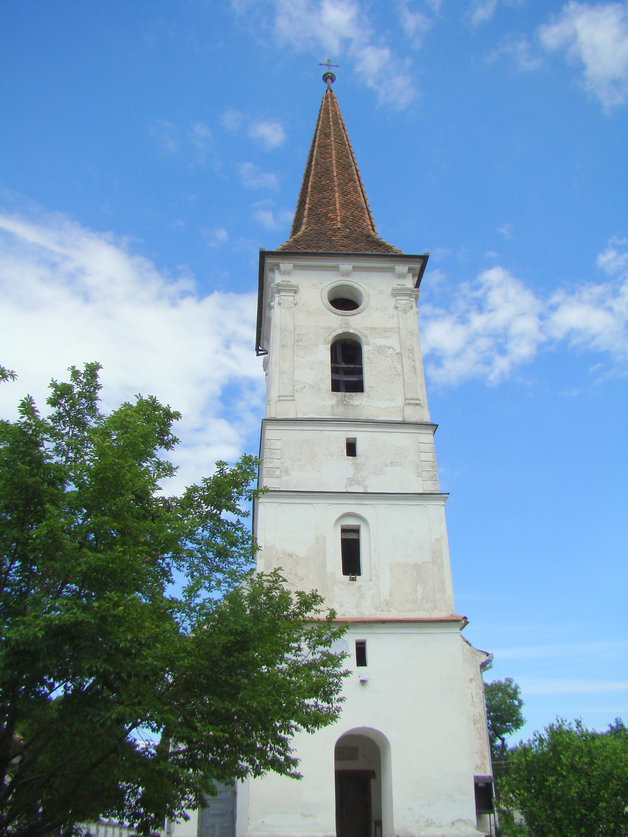 Biserica „Sf. Treime”, cu turnul-clopotniță, sat Sibiel; oraș Săliște